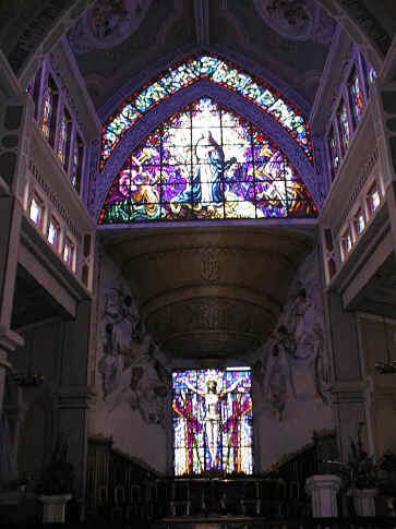 Iglesia Inmacula La Azulita